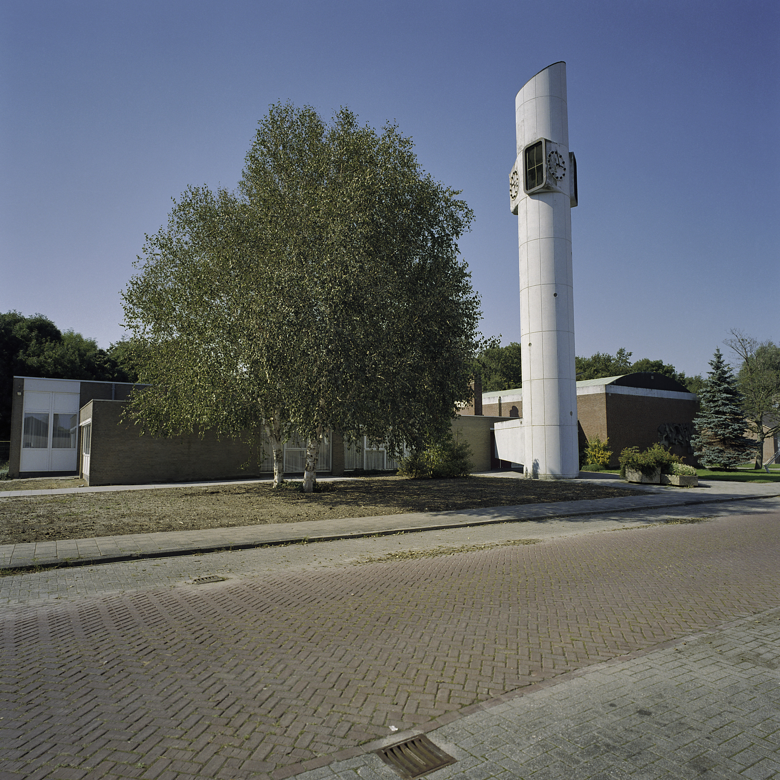 Una Sancta: Overzicht op wit geschilderde vrijstaande en ronde kerktoren met wijzerplaat (opmerking: Gefotografeerd voor Monumenten In Nederland Flevoland)